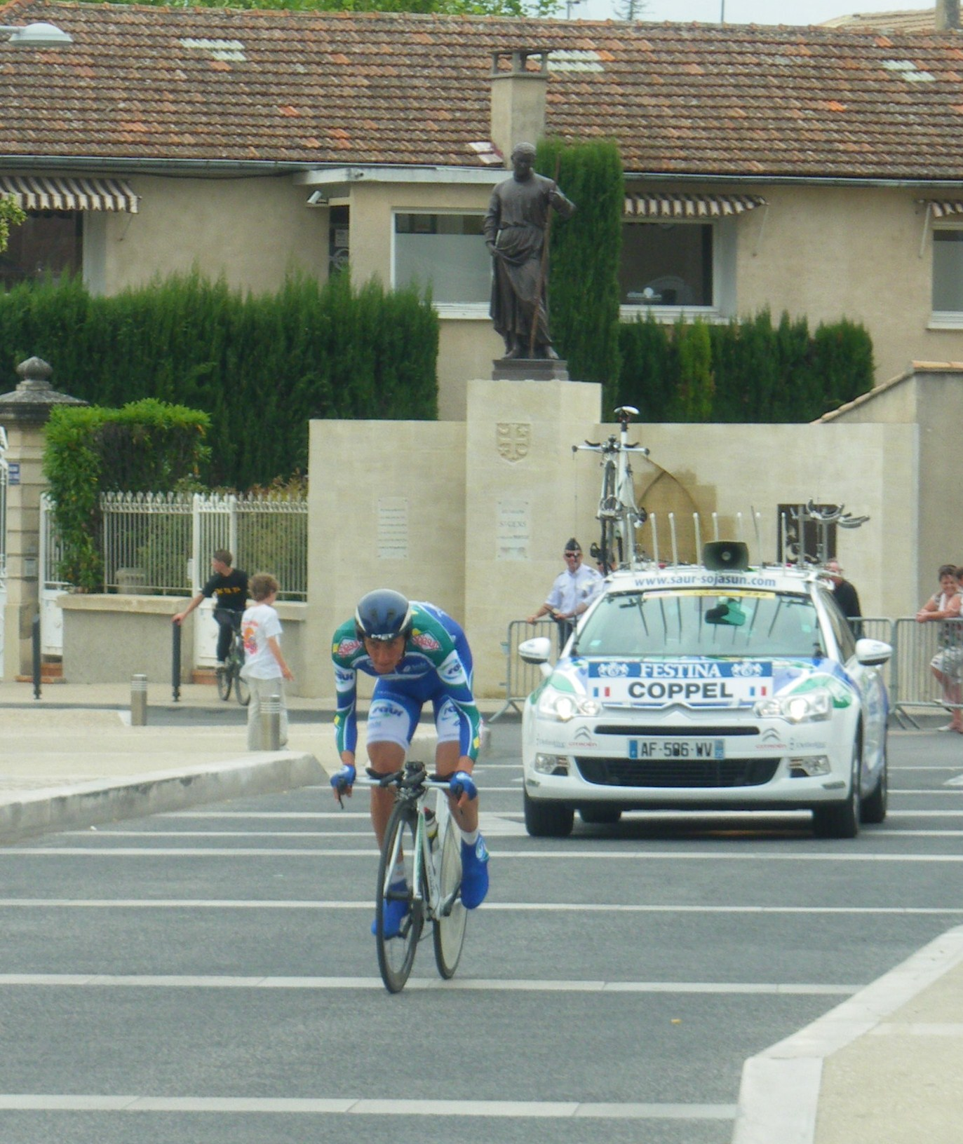 Jérôme Coppel lors de la 3ème étape du Critérium Dauphiné Libéré 2010 (Monteux - Sorgues)